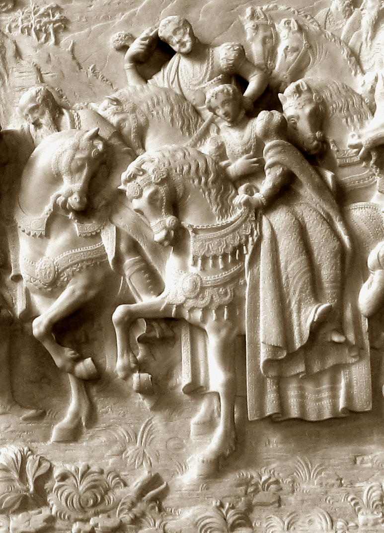 Detail des Bildreliefs zu Inschrift Nr. 8: "...puella regio cultu ornata cum comitatu equestri Gallico..." - Die (13-jährige) Tochter Maximilians, königlich geschmückt, kehrt aus Frankreich zurück, eskotiert von französischen Reitern